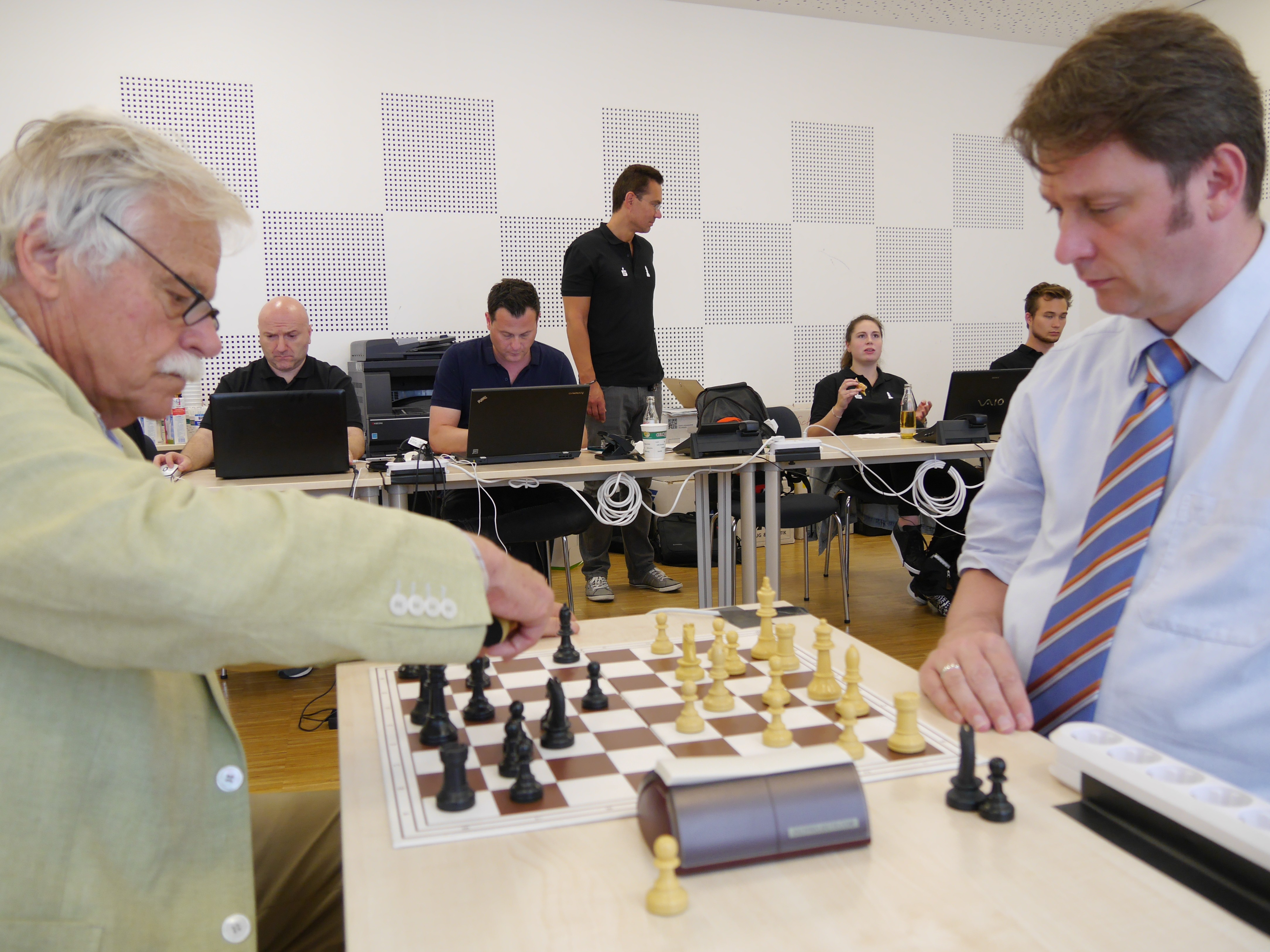 Vlastimil Hort blitzt mit Stefan Koth im Pressezentrum der Dortmunder Schachtage 2016.